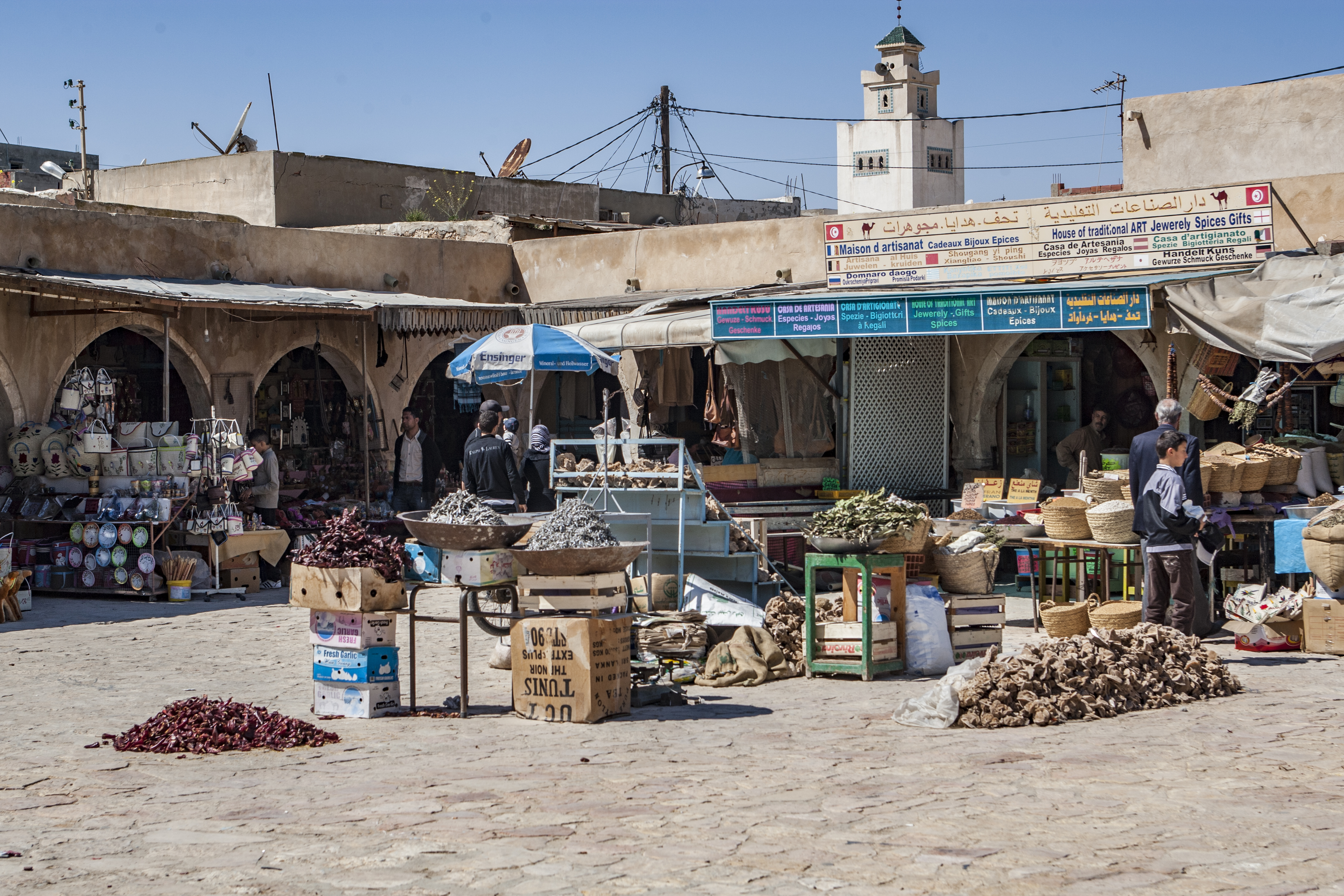 Kabis. Suk przyprawowy Jara